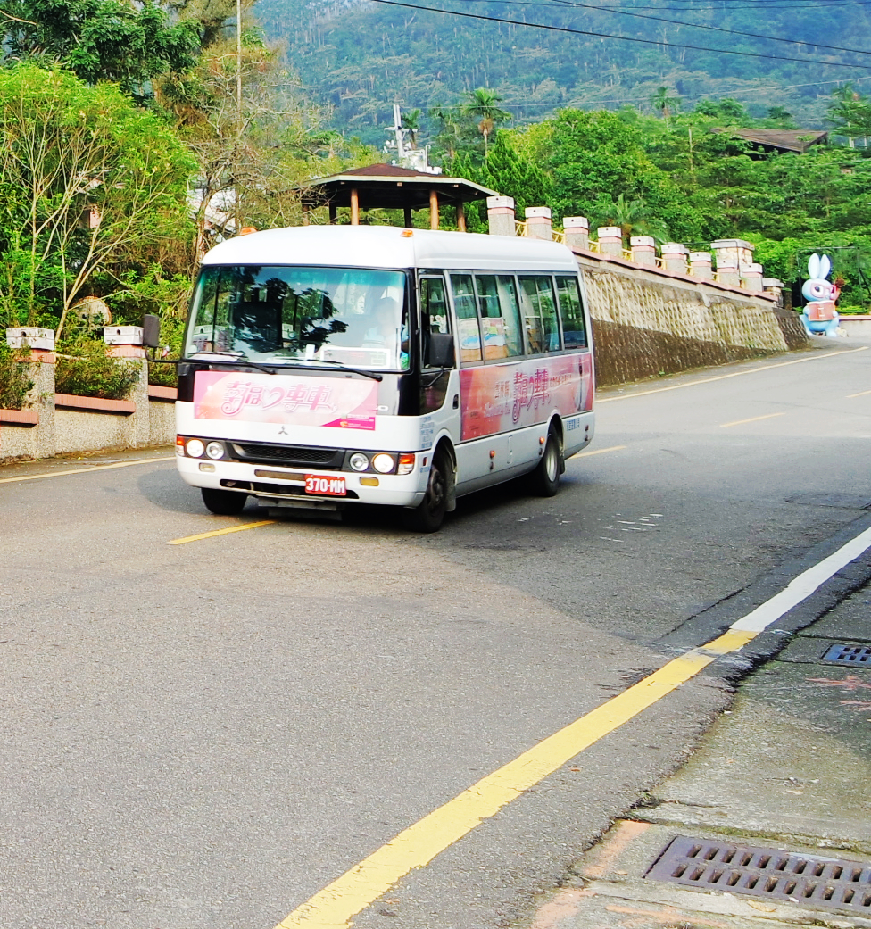 雲林縣免費幸福專車370-MM 永光-古坑 雲林縣政府委託民間遊覽車業者經營